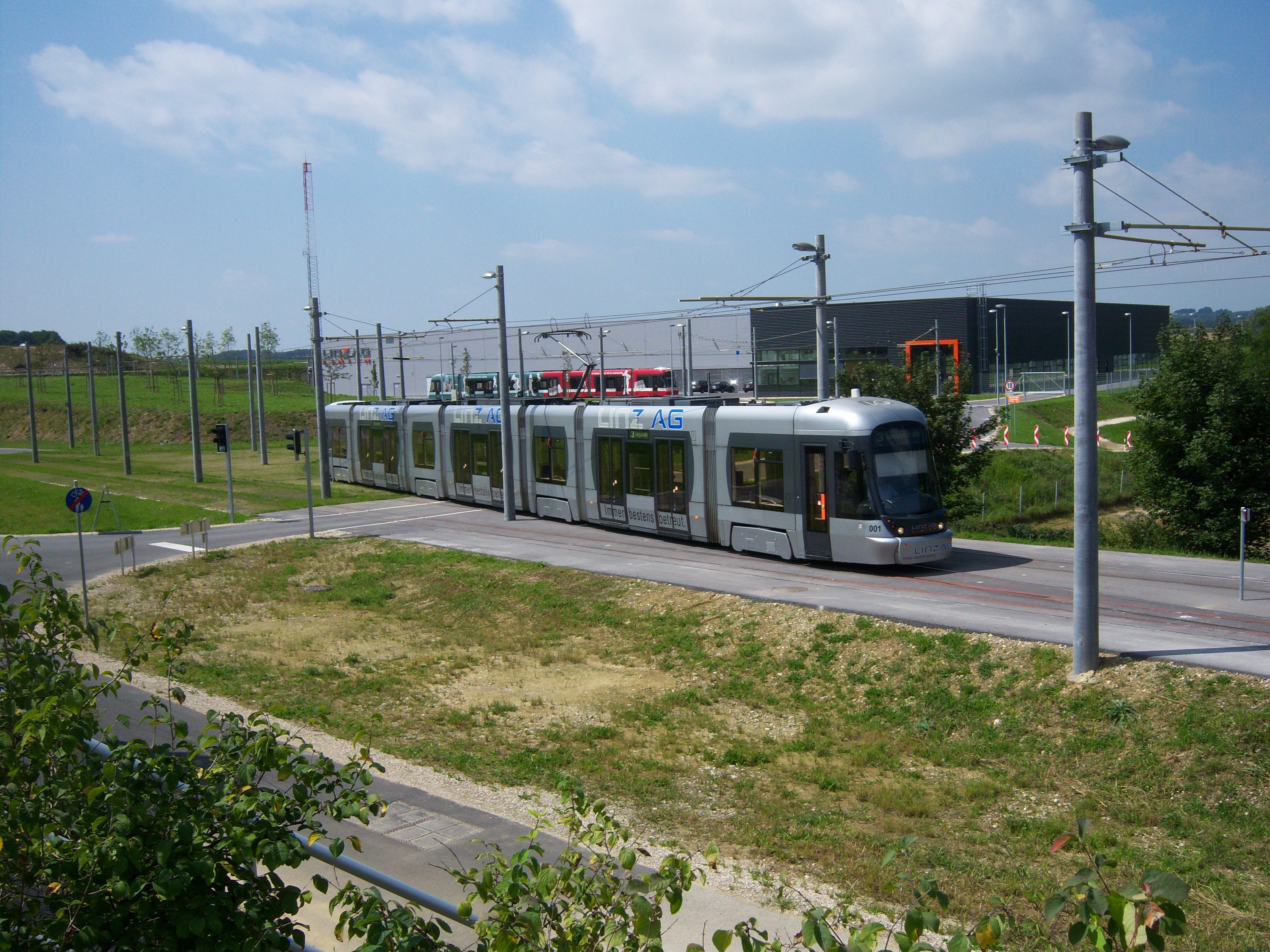 Remise Weingartshof der Straßenbahnlinie 3 (Linz–Leonding)